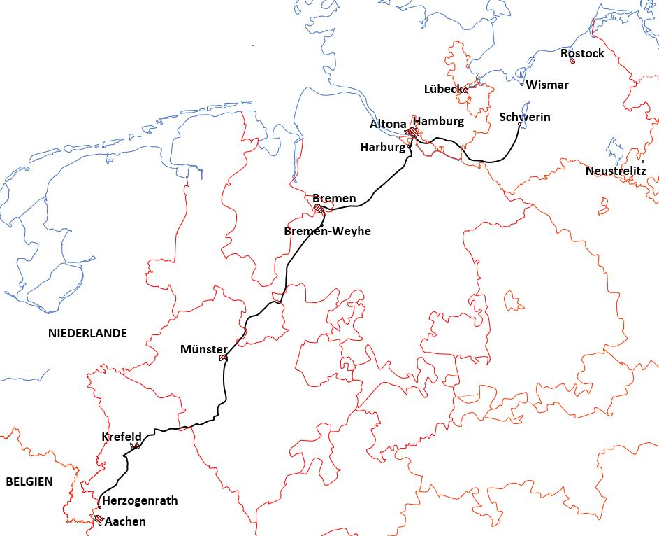 Route des Eisenbahntransport der II. Abteilung/FAR-60 zur beschleunigte Heranführung